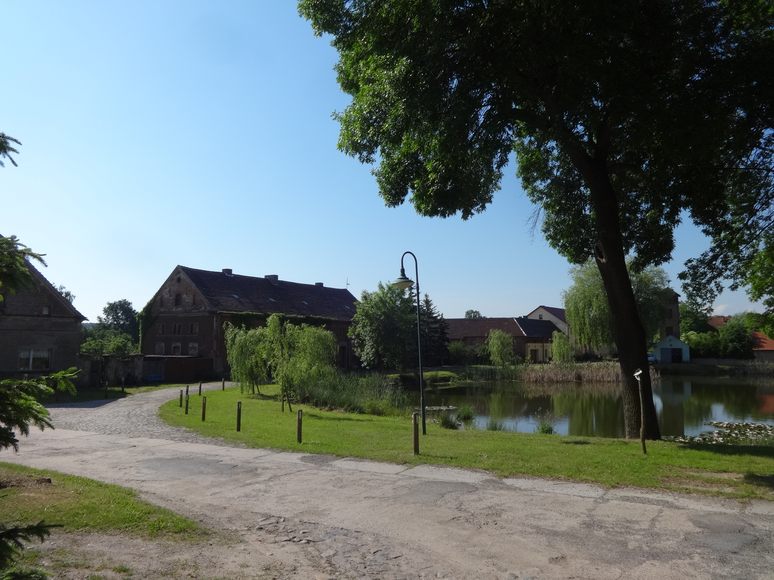 Dorfanger von Kemlitz (Baruth/Mark)